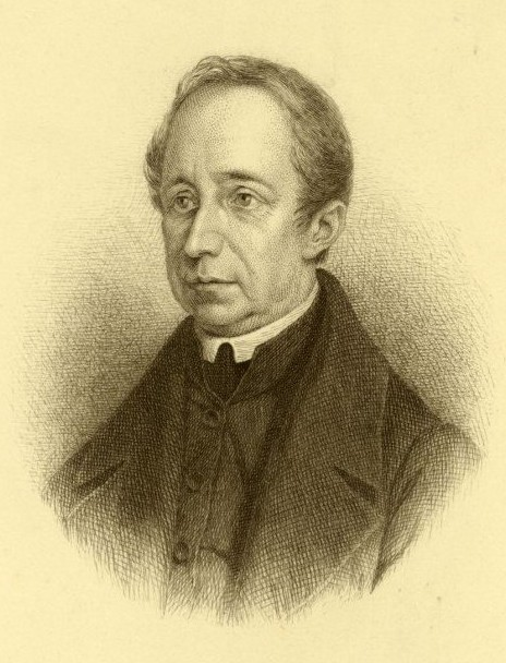 Anton Günther (1783-1863), rakouský filosof a teolog